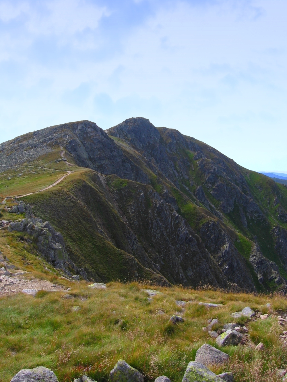 szczyt Derese